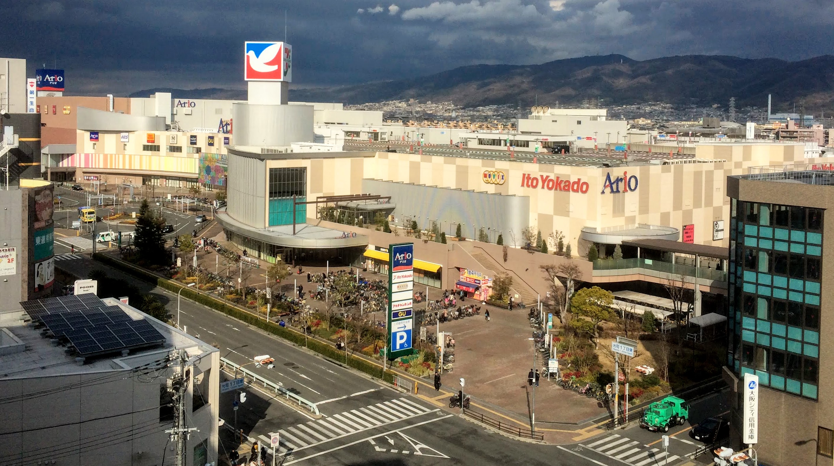 アリオ八尾の建物全景（行灯更新後）